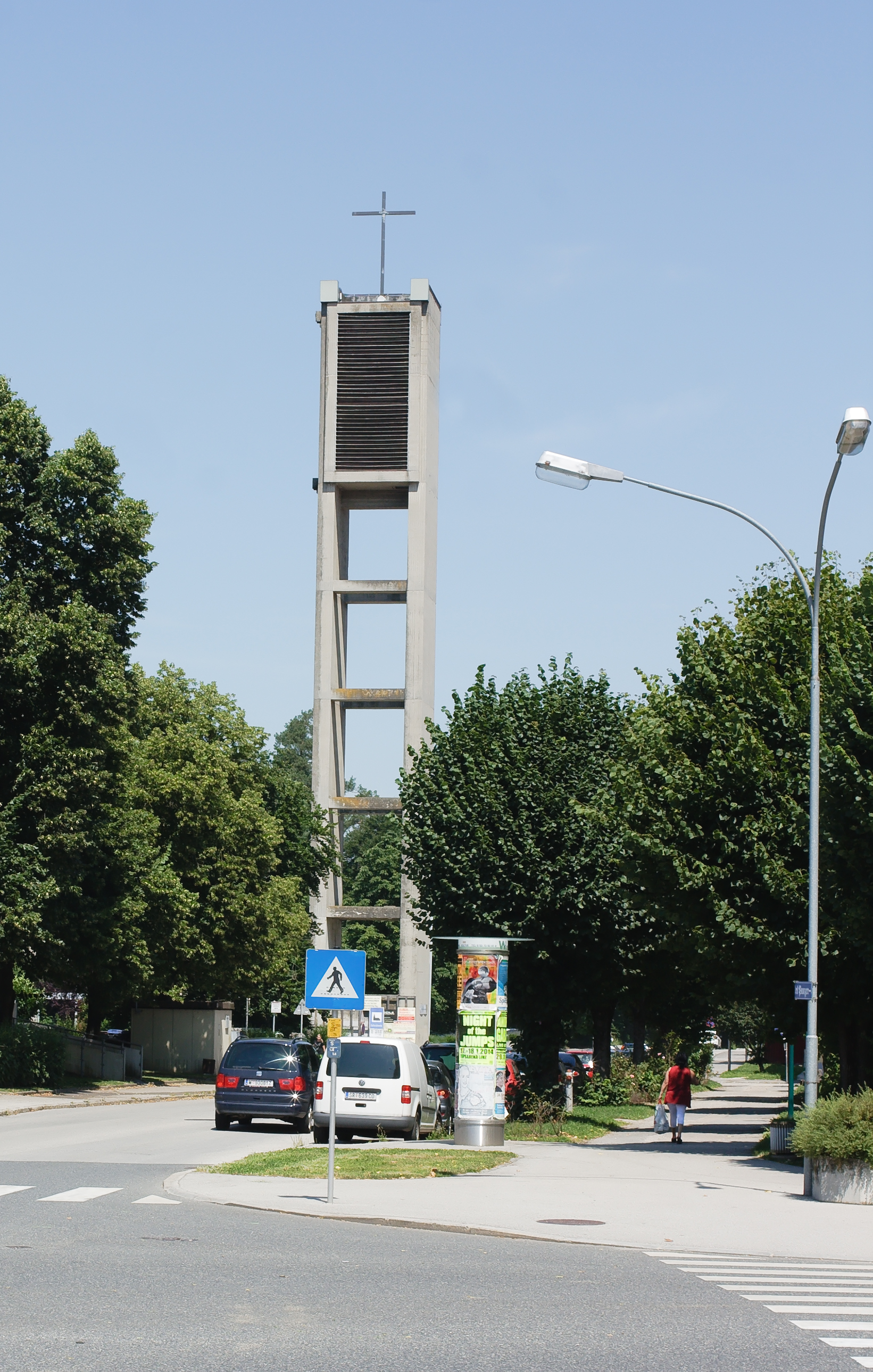 Steyr: Blick von der Karl-Punzer-Straße auf den Turm der Neuen Pfarrkirche Münichholz.